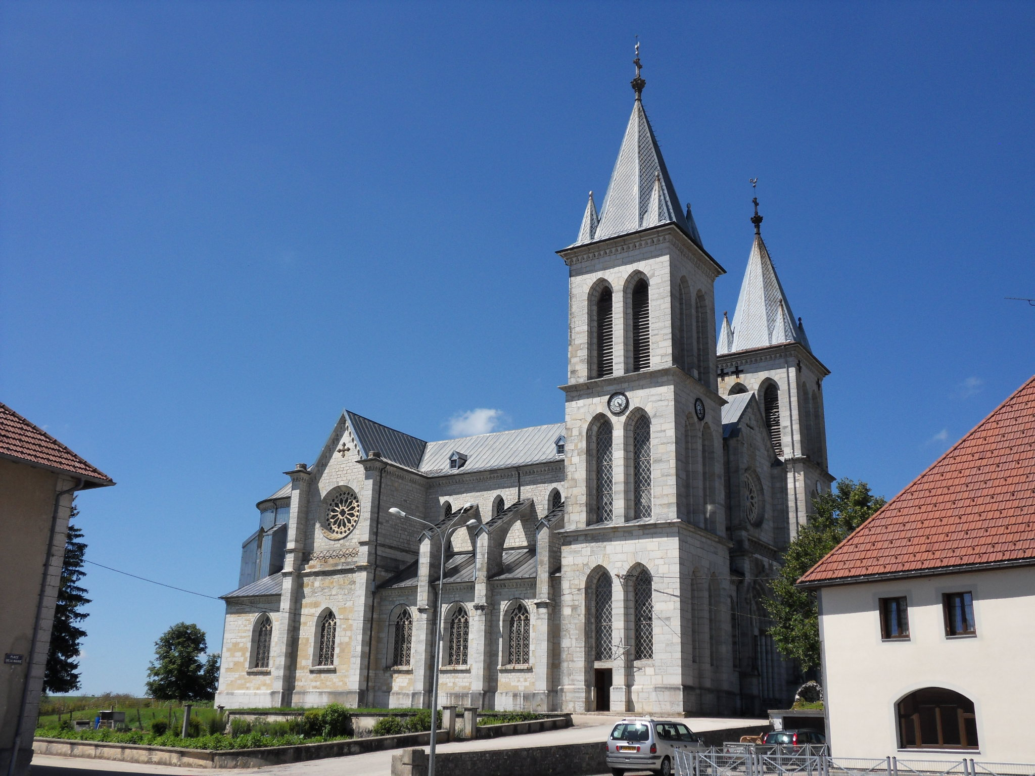 Église de Boujailles Région de Franche-Comté. Département du Doubs